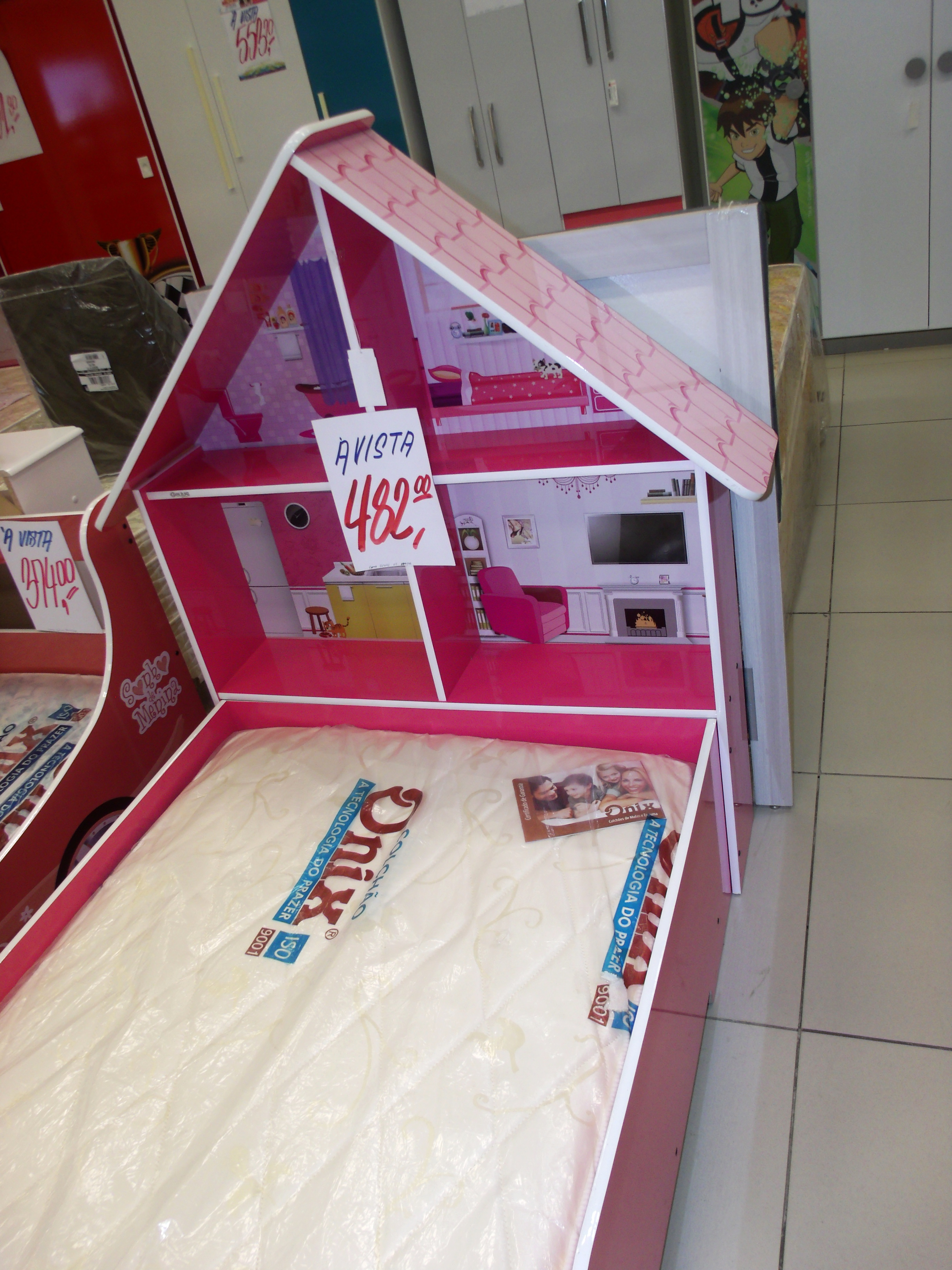 Cama infantil com prateleira de casinha no Armazém Paraíba, no Piauí